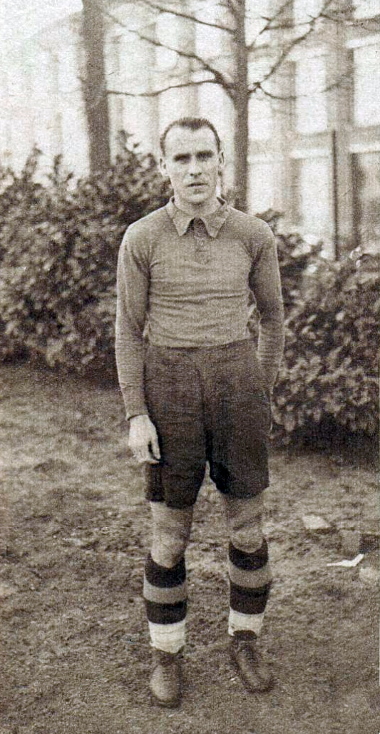 Henri Hiltl, footballeur (1939, Excelsior AC Roubaix).